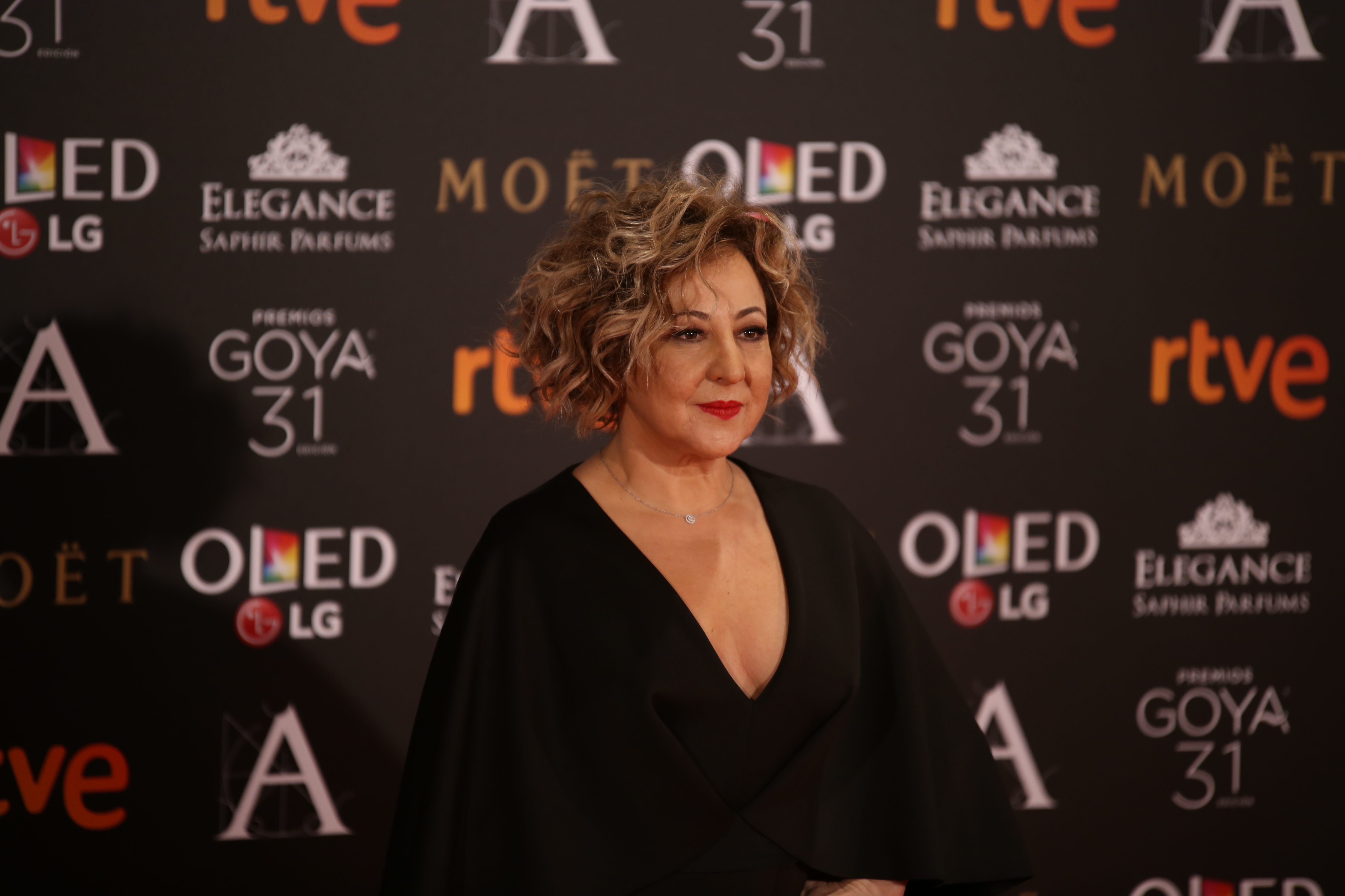 Premios Goya 2017